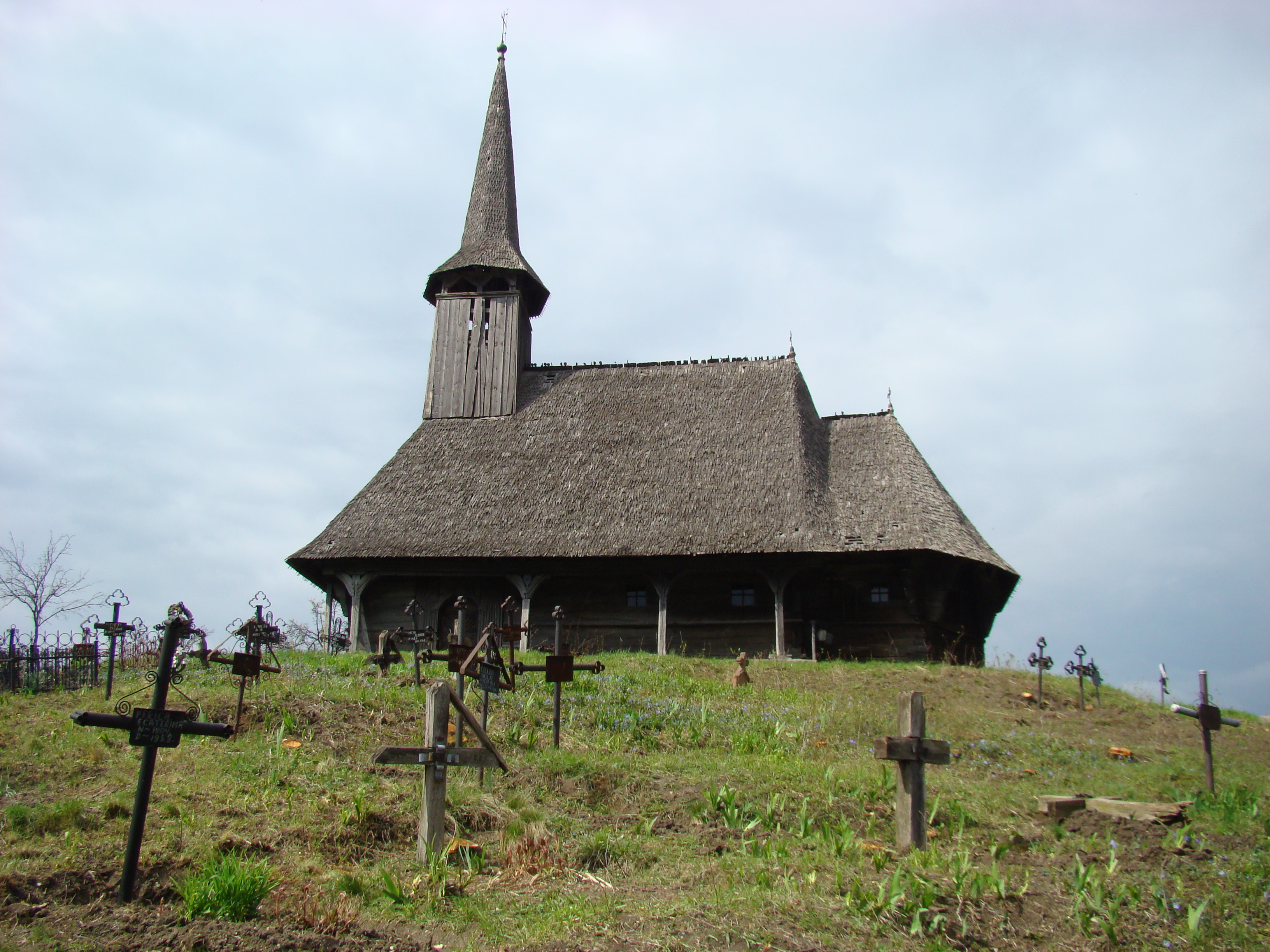 Biserica de lemn din Surduc, județul Bihor